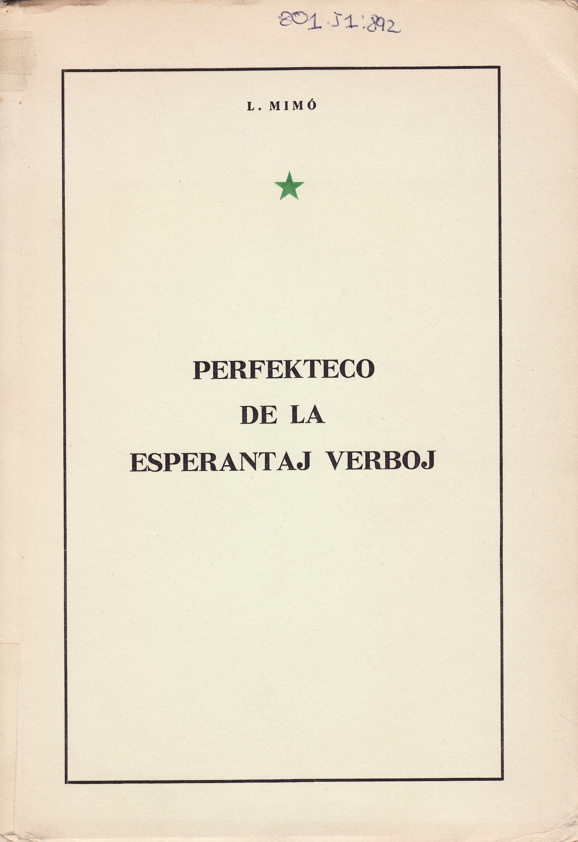 librokovrilo de libro "Perfekteco de la Esperantaj Verboj", 1961